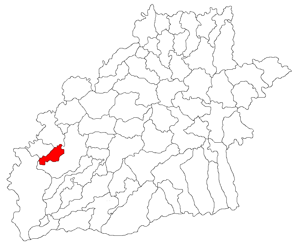 Categorie:Hărţi ale judeţului Sibiu